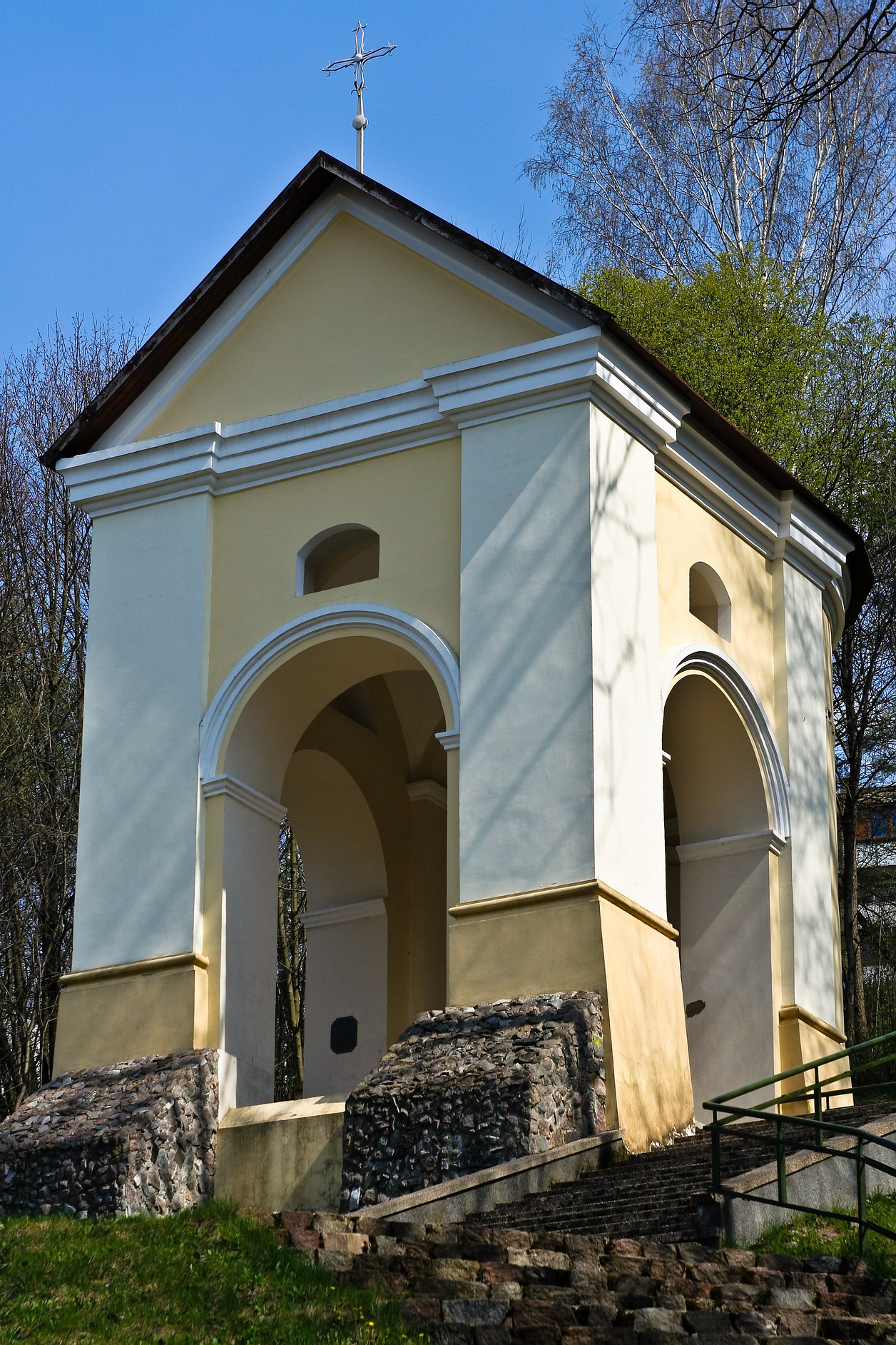 Calvary Chapel in Žirmūnai Vilnius.